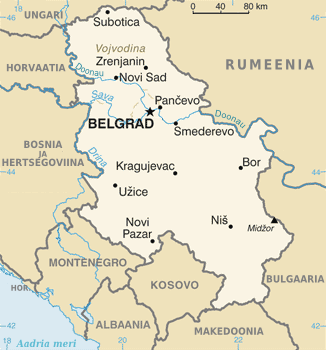 Serbia kaart